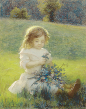 Lucille au bouquet de roses